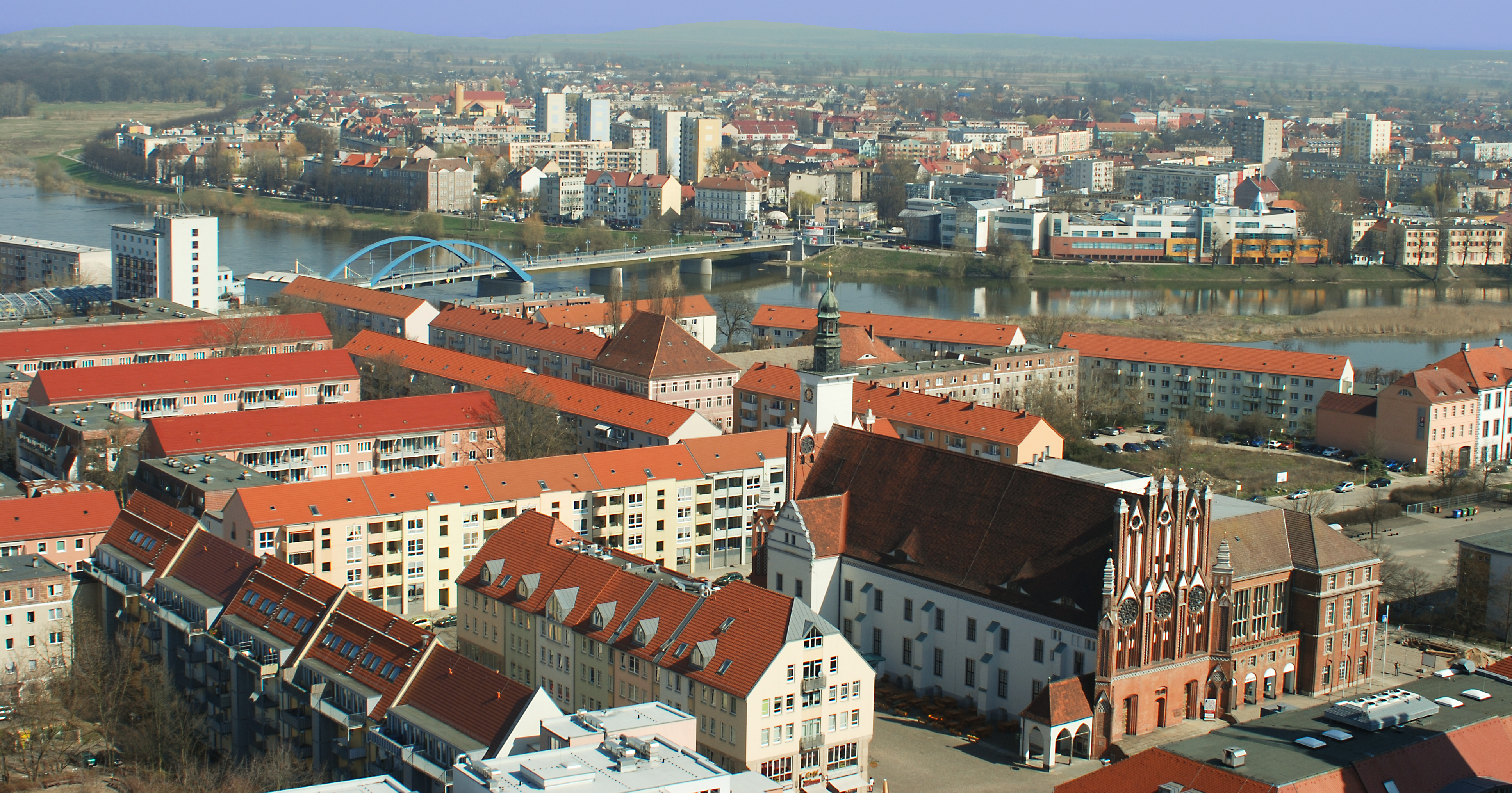 Blick auf die Innenstadt von Frankfurt (Oder).